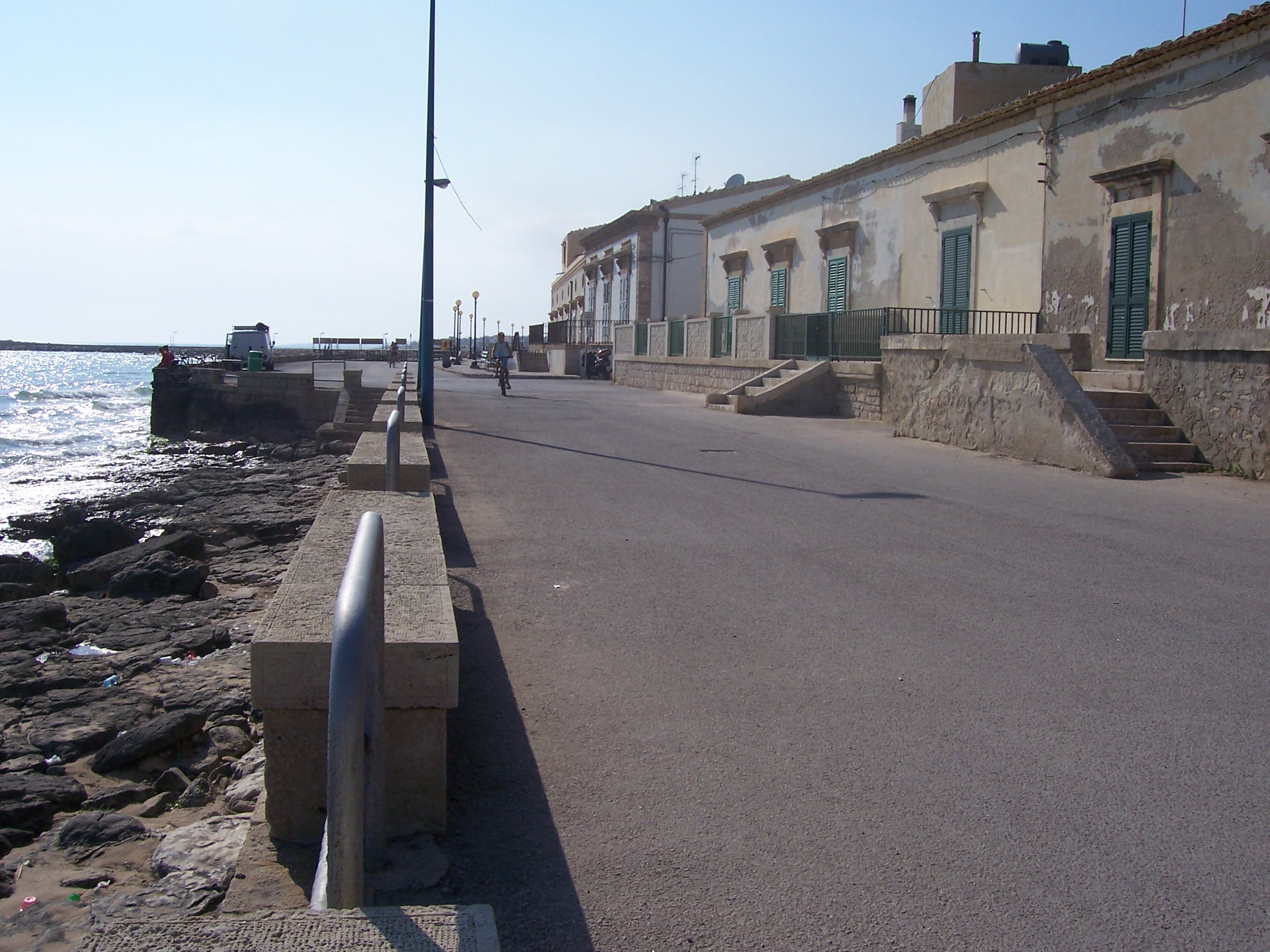 Donnalucata